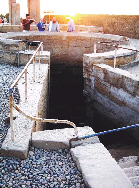 Escada de acesso do nilometro do templo de Kom Ombo